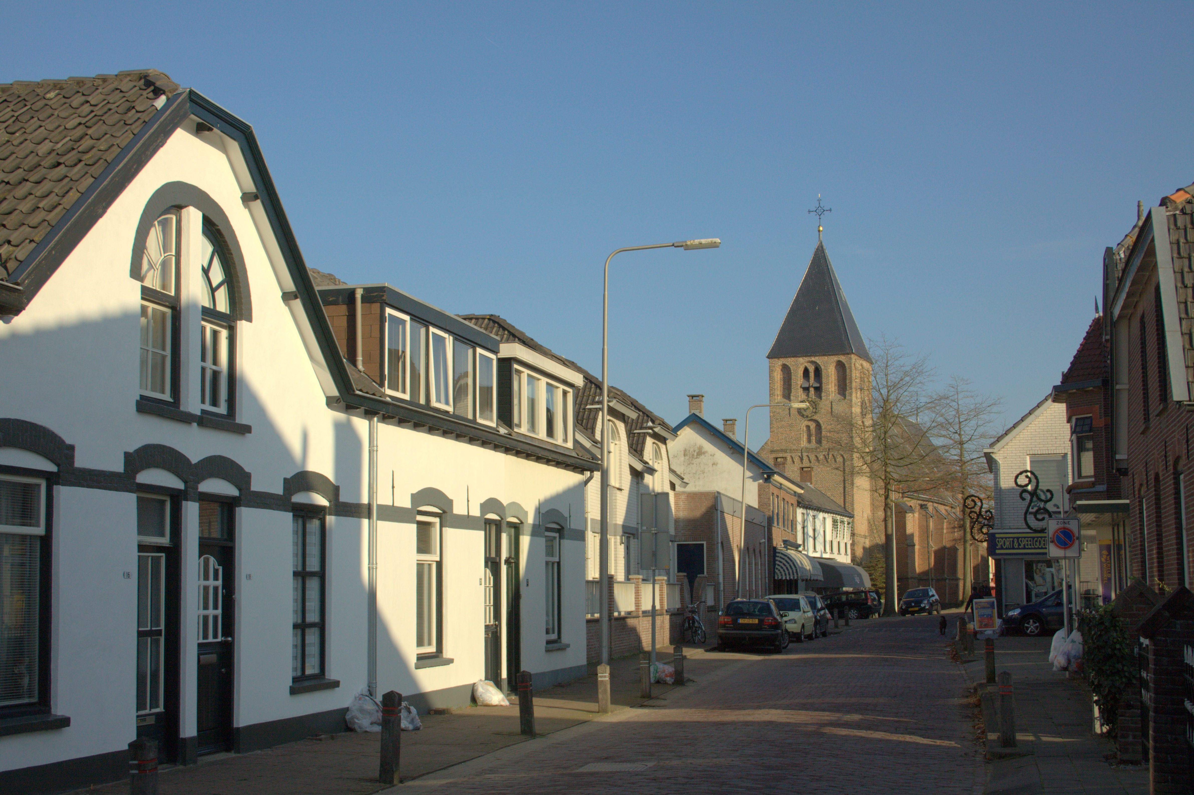 Aan de zonzijde van de Kerkstraat in Geldermalsen.